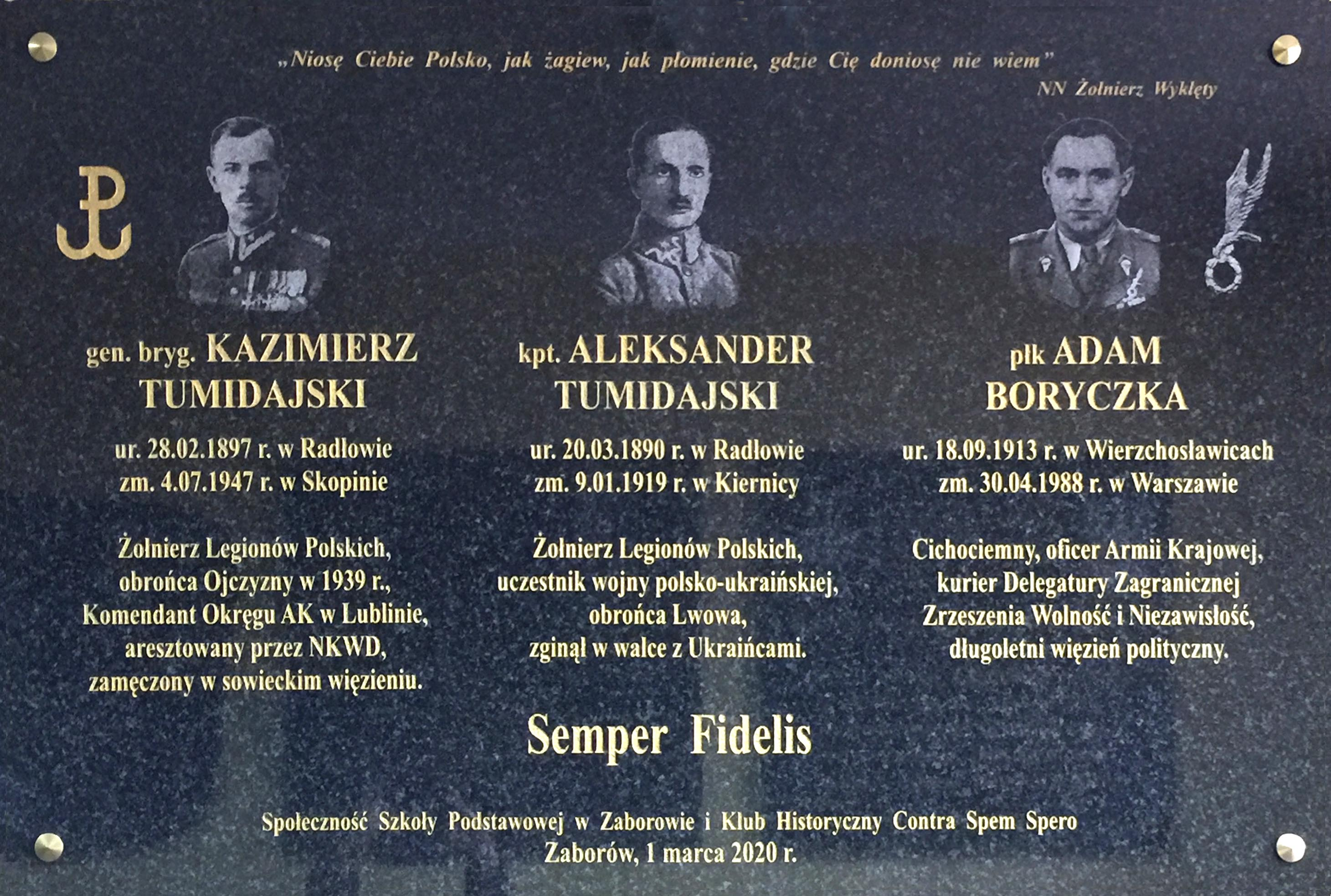 Odsłonięcie tablicy dn. 1 marca 2020